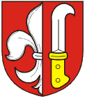 Znak obce Chvalovice Includes heraldically "dimidiated" fleur-de-lis.